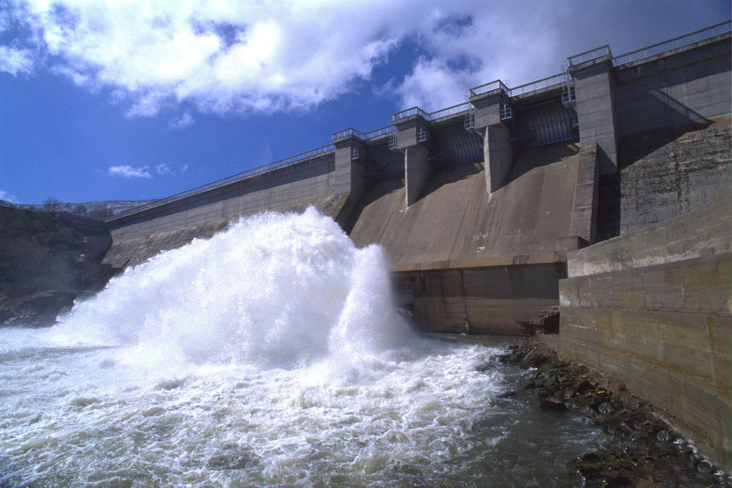 La presa es de gravedad, de 30 metros de altura y 295 de longitud. Puede embalsar hasta 38 hm³.